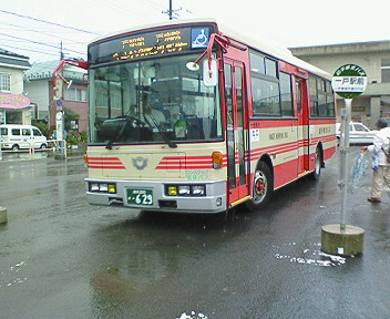 岩手県北自動車：一般路線中型車両（日産ディーゼル・RM・KK-RM252GAN/LED行先表示） 一戸駅にて